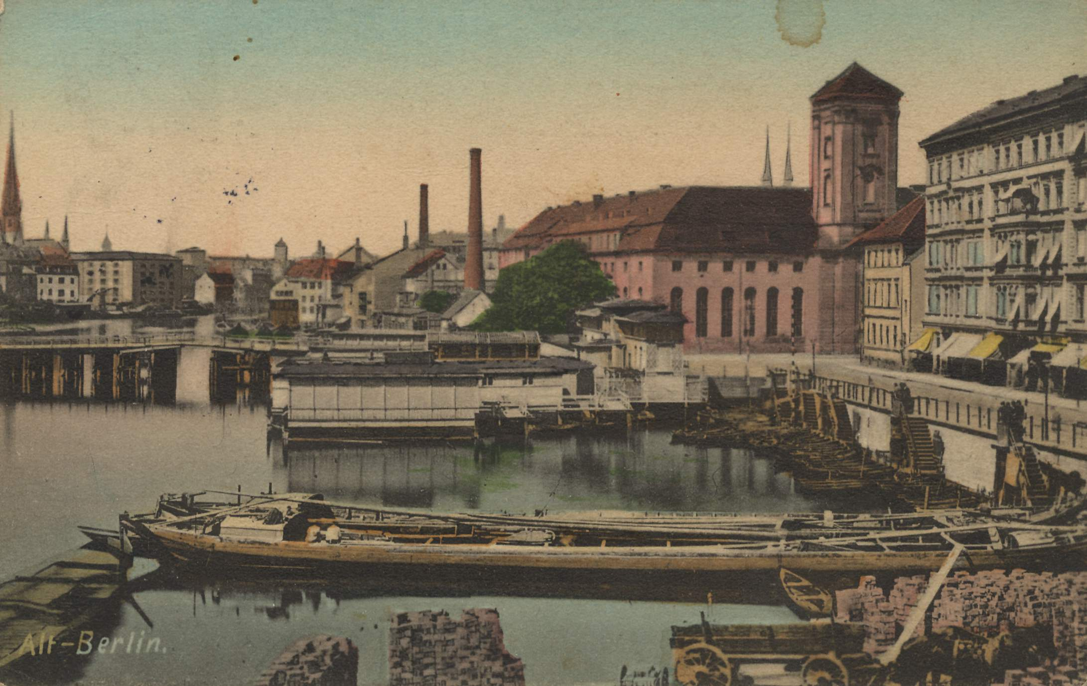 Waisenbrücke in Berlin-Mitte. Rechts das Waisenhaus.